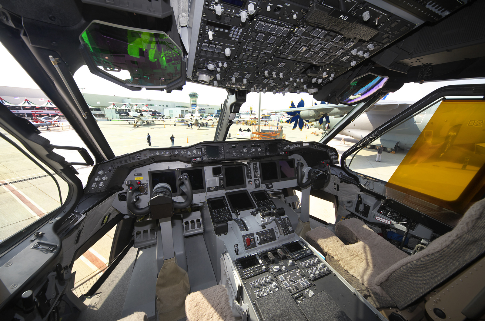 Japan 68-1203 / 203 World Central Intl - Dubai - (OMDW / DWC) Kawasaki XC-2 cn 003 UAE , 2017